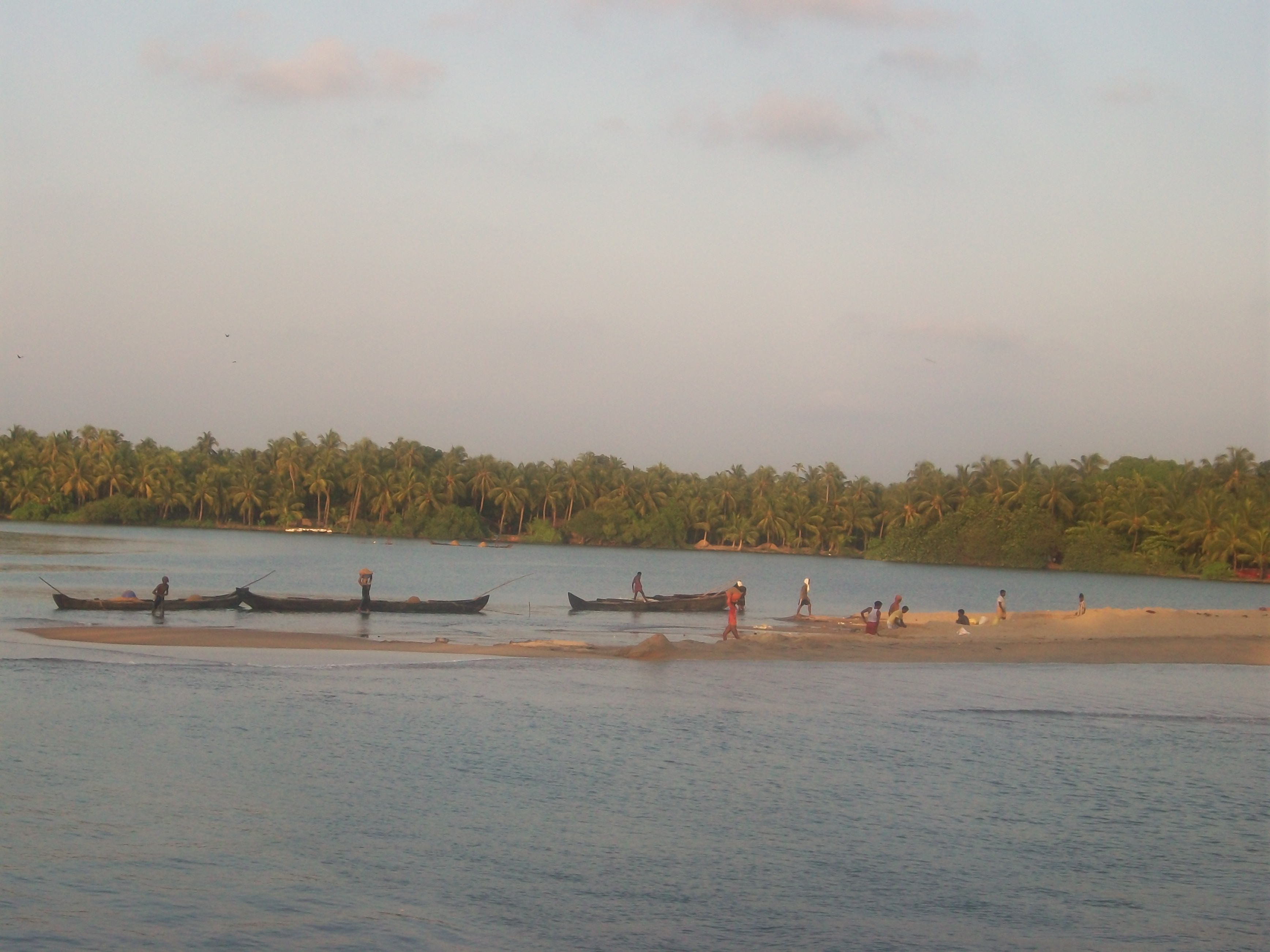 പുതുപൊന്നാനി മുനമ്പം അഴിമുഖത്തു നിന്നുള്ള ദൃശ്യം